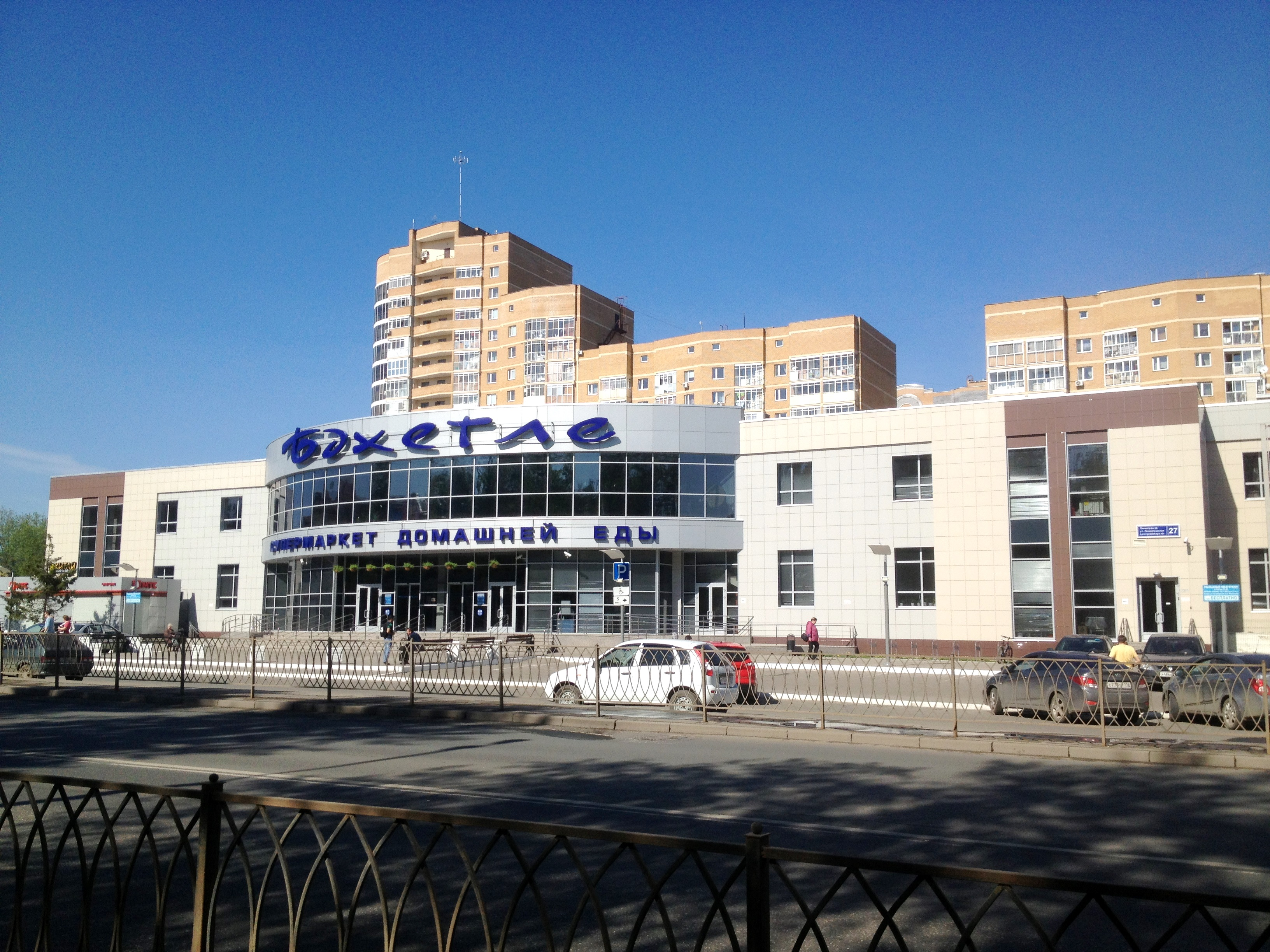 Супермаркет домашней еды «Бәхетле» на ул. Ленинградская (дом 27) г. Казани.